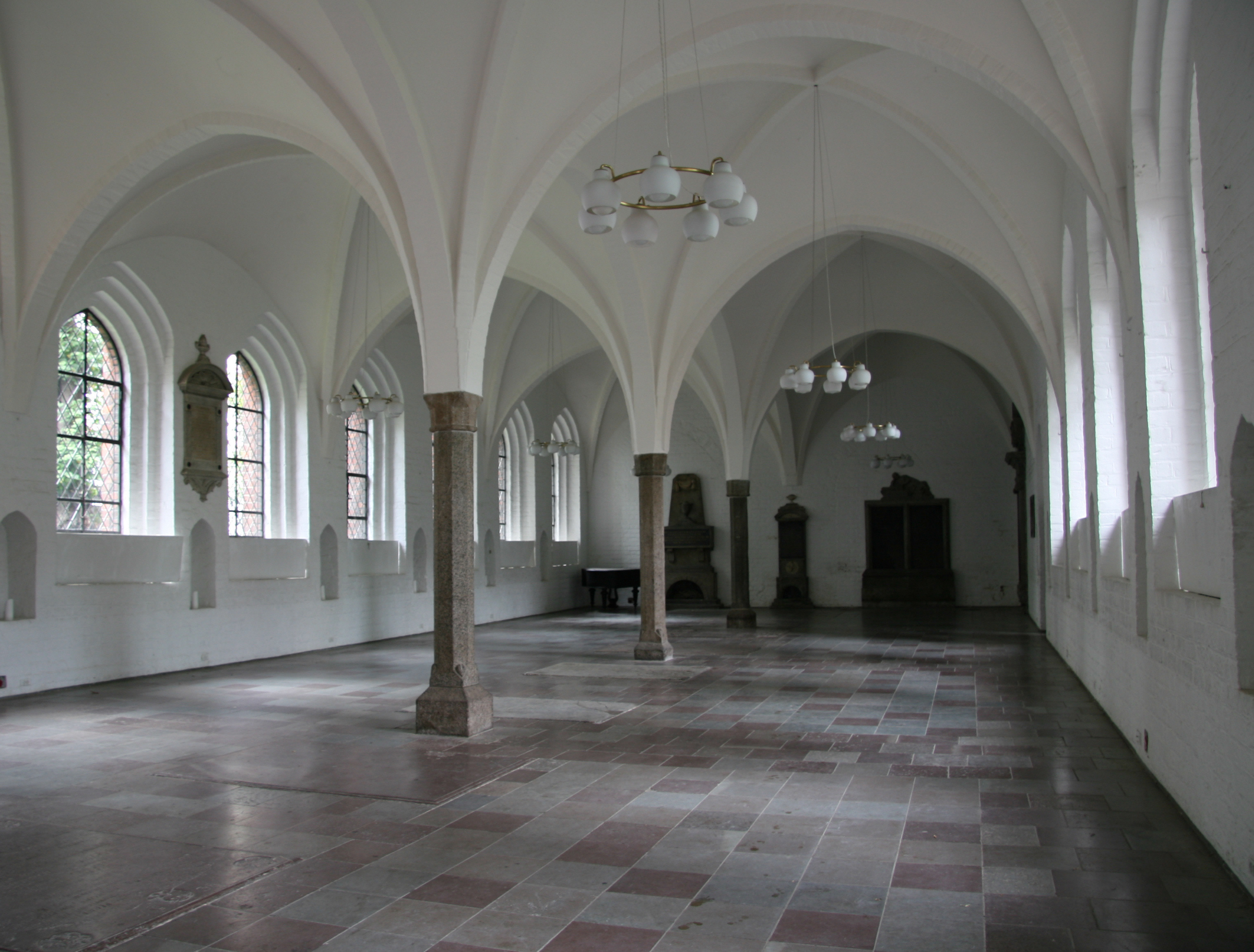 Helligåndskirken, Copenhagen, Denmark. Helligaandshuset, exhibition hall.